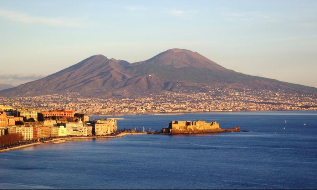 Golfo da Via Orazio, Zoom X2.